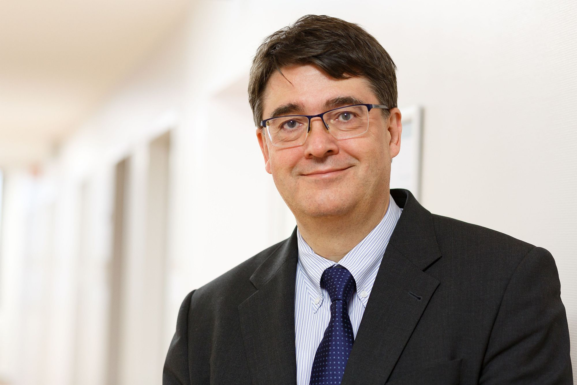 Michael Baumann, Vorstandsvorsitzender und Wissenschaftlicher Vorstand des Deutschen Krebsforschungszentrums